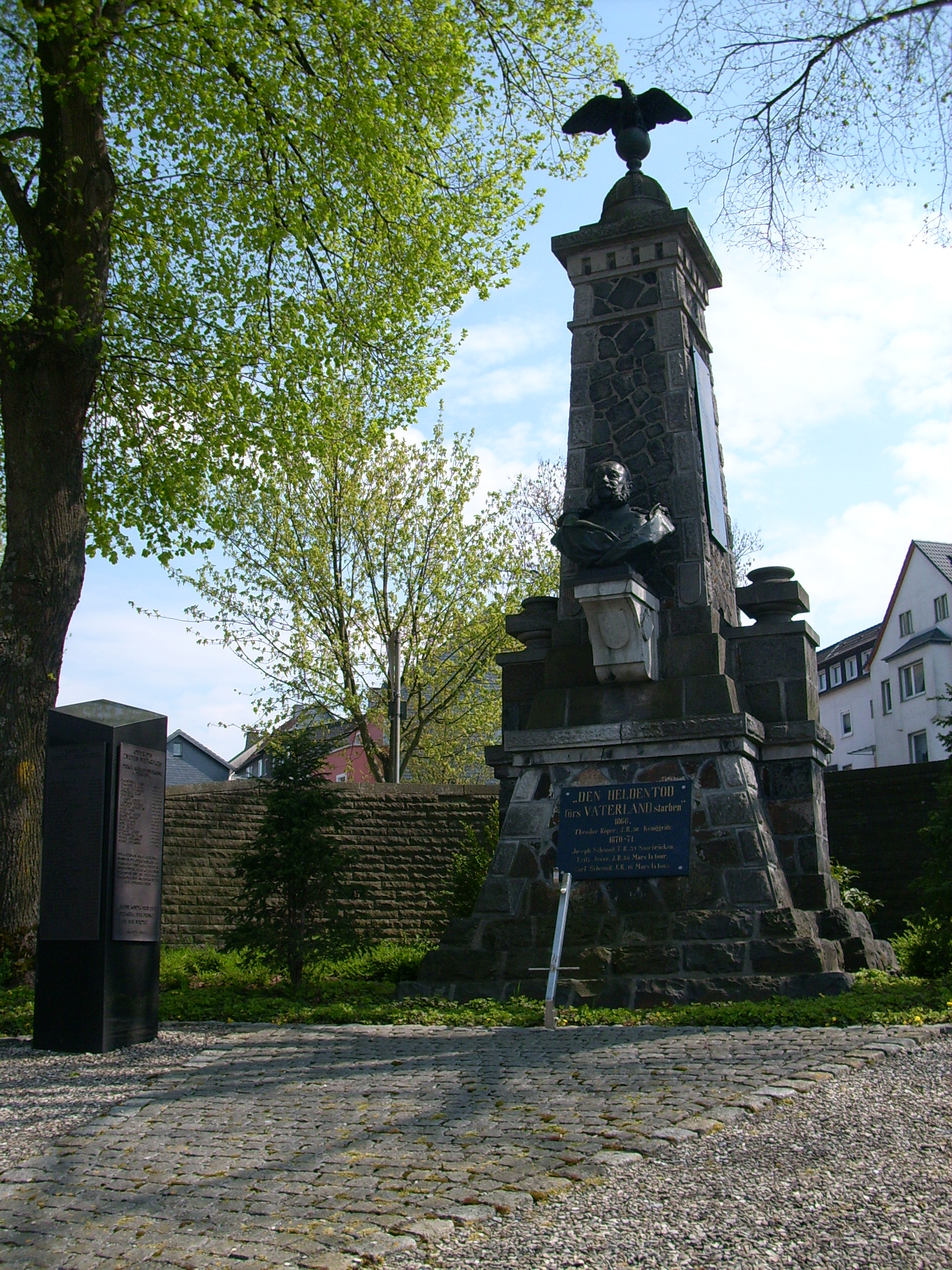 Ehrenmal in Belecke